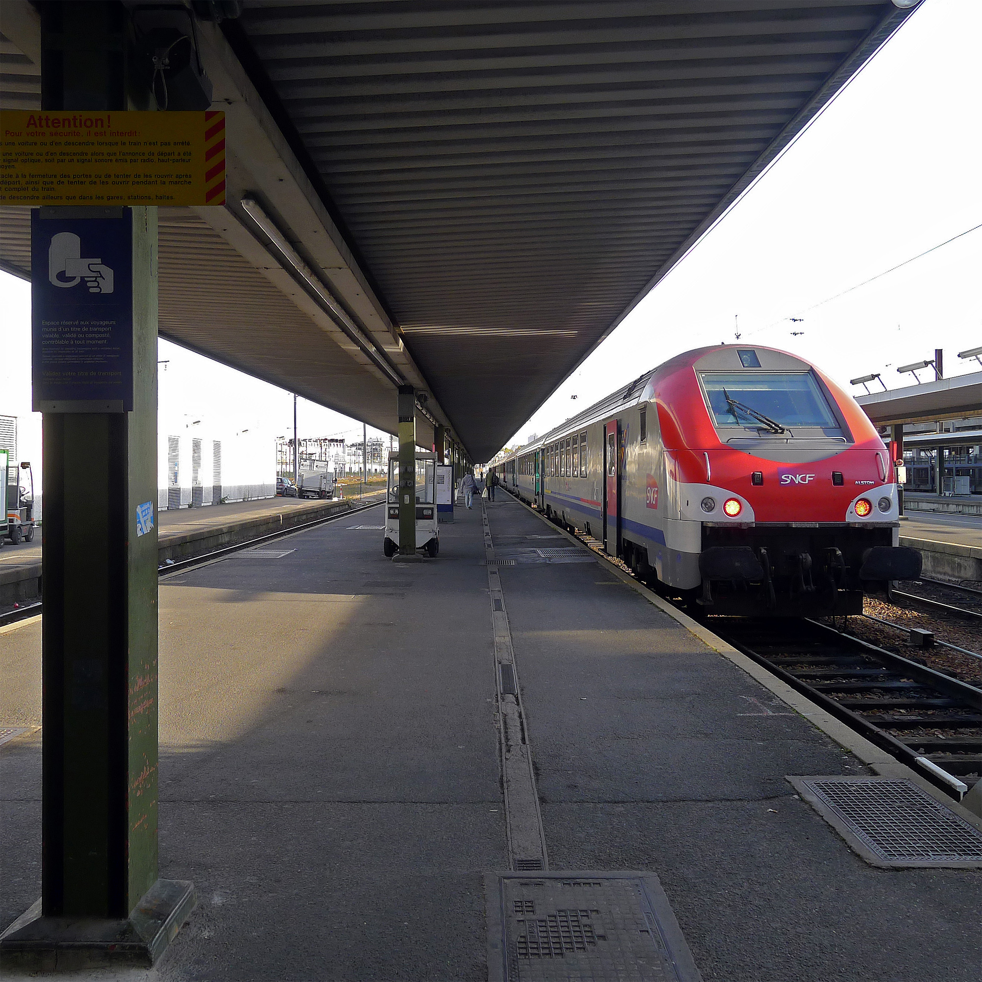 Gare de Paris-Bercy (quai) - Paris XII